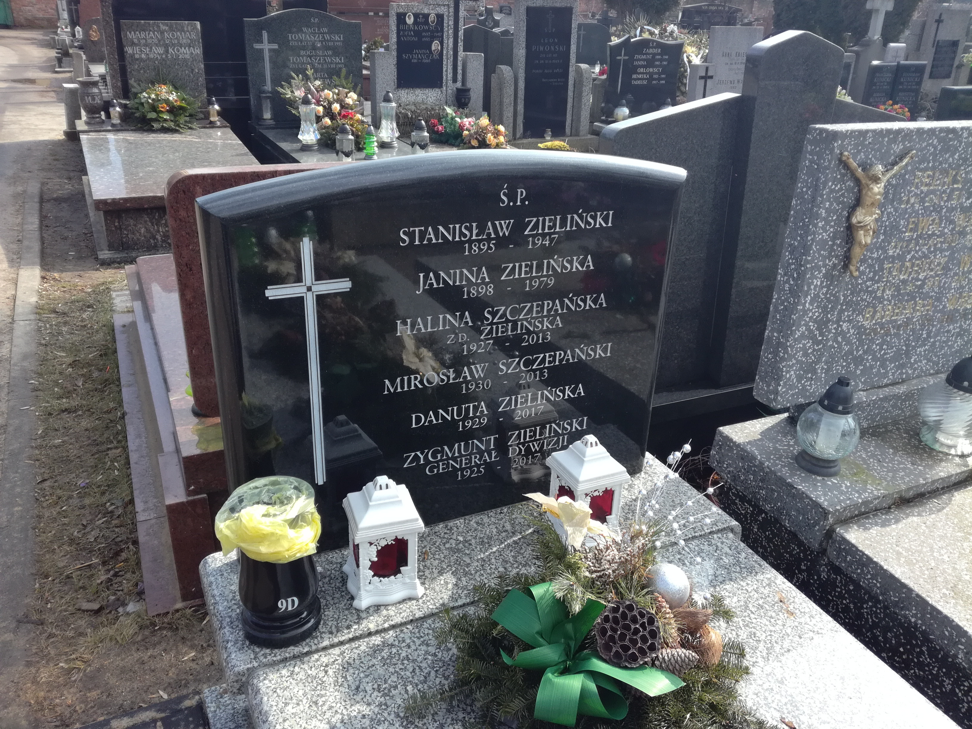 grób generała dywizji Zygmunta Zielińskiego na Cmentarzu Bródnowskim.